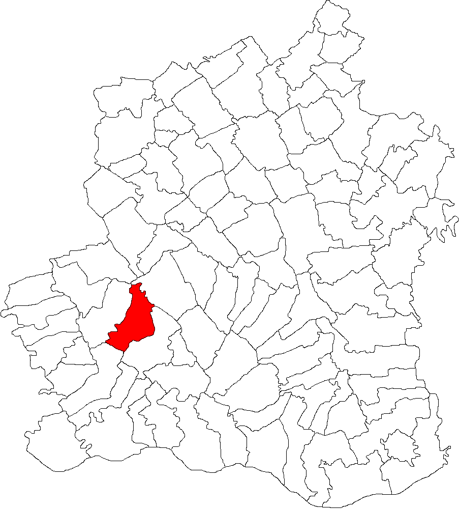 Categorie:Hărţi ale judeţului Teleorman